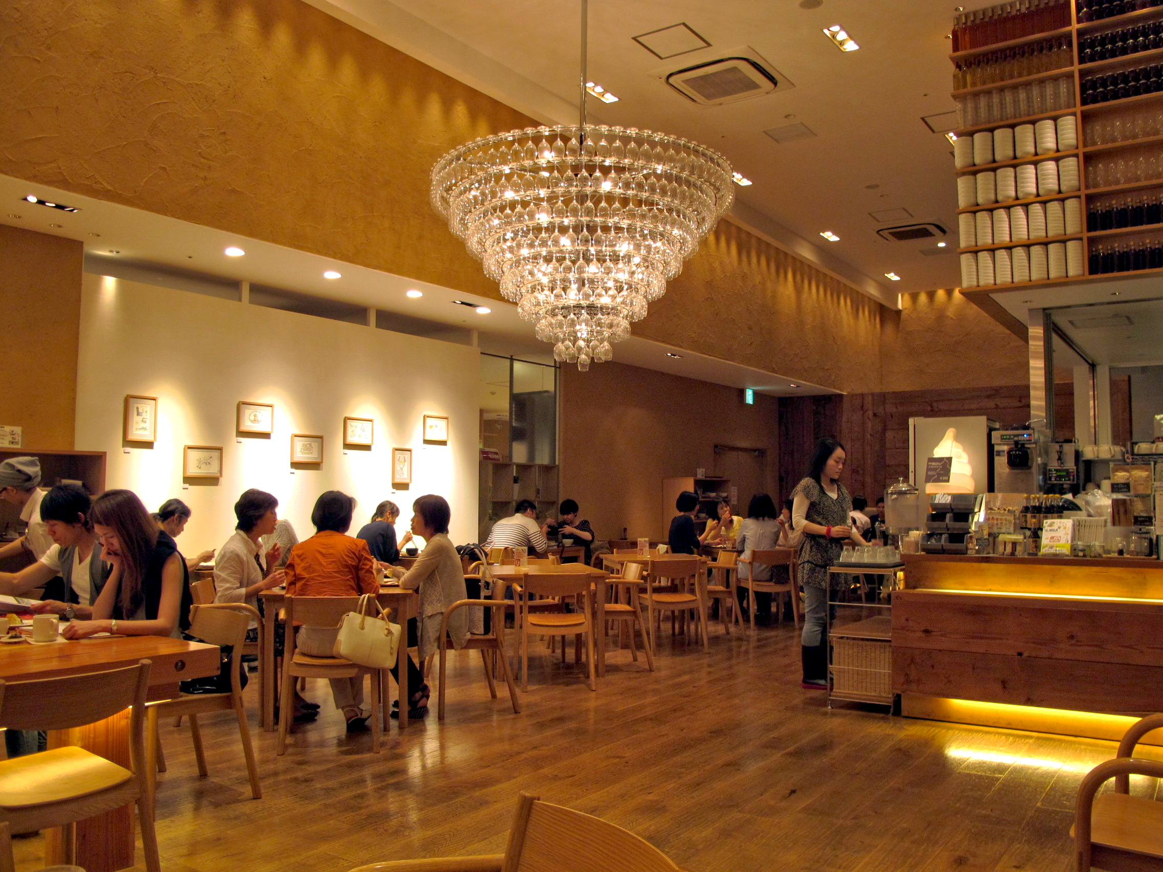 Café Muji Shinjuku Store Interior